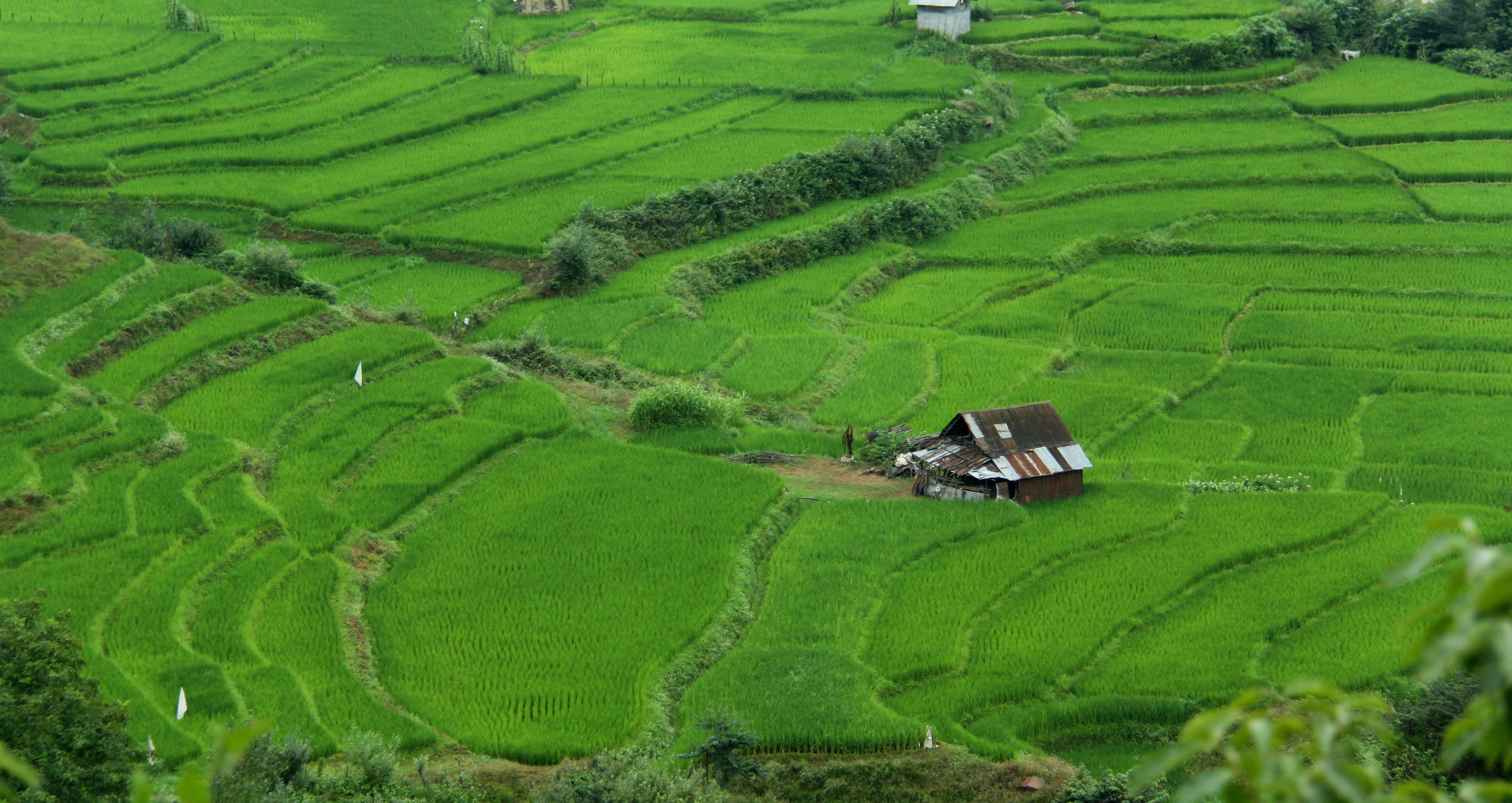 بندپی